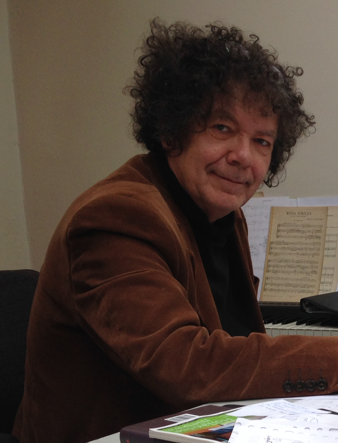 Mark van Platen, Nederlands componist, op zijn werkkamer